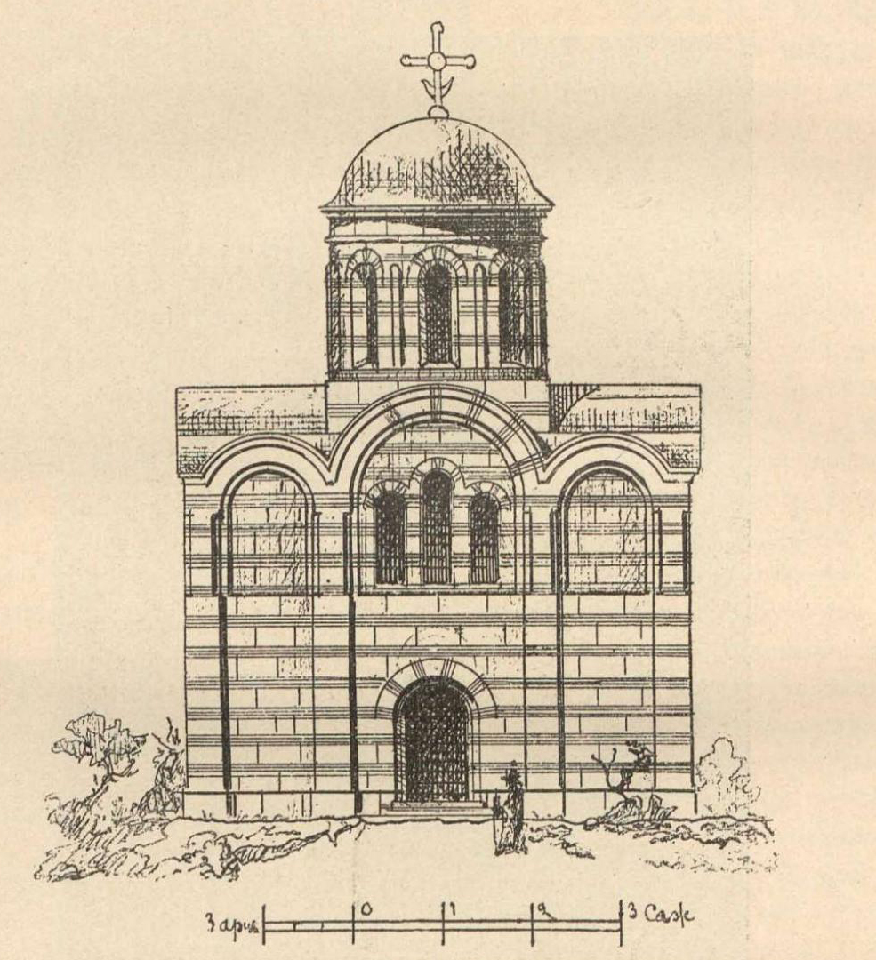 Беларуская (тарашкевіца): Віцебск (Viciebsk), Ніжні Замак (Nižni Zamak). Царква Зьвеставаньня Багародзіцы. Гіпатэтычная рэканструкцыя аўтэнтычнага выгляду